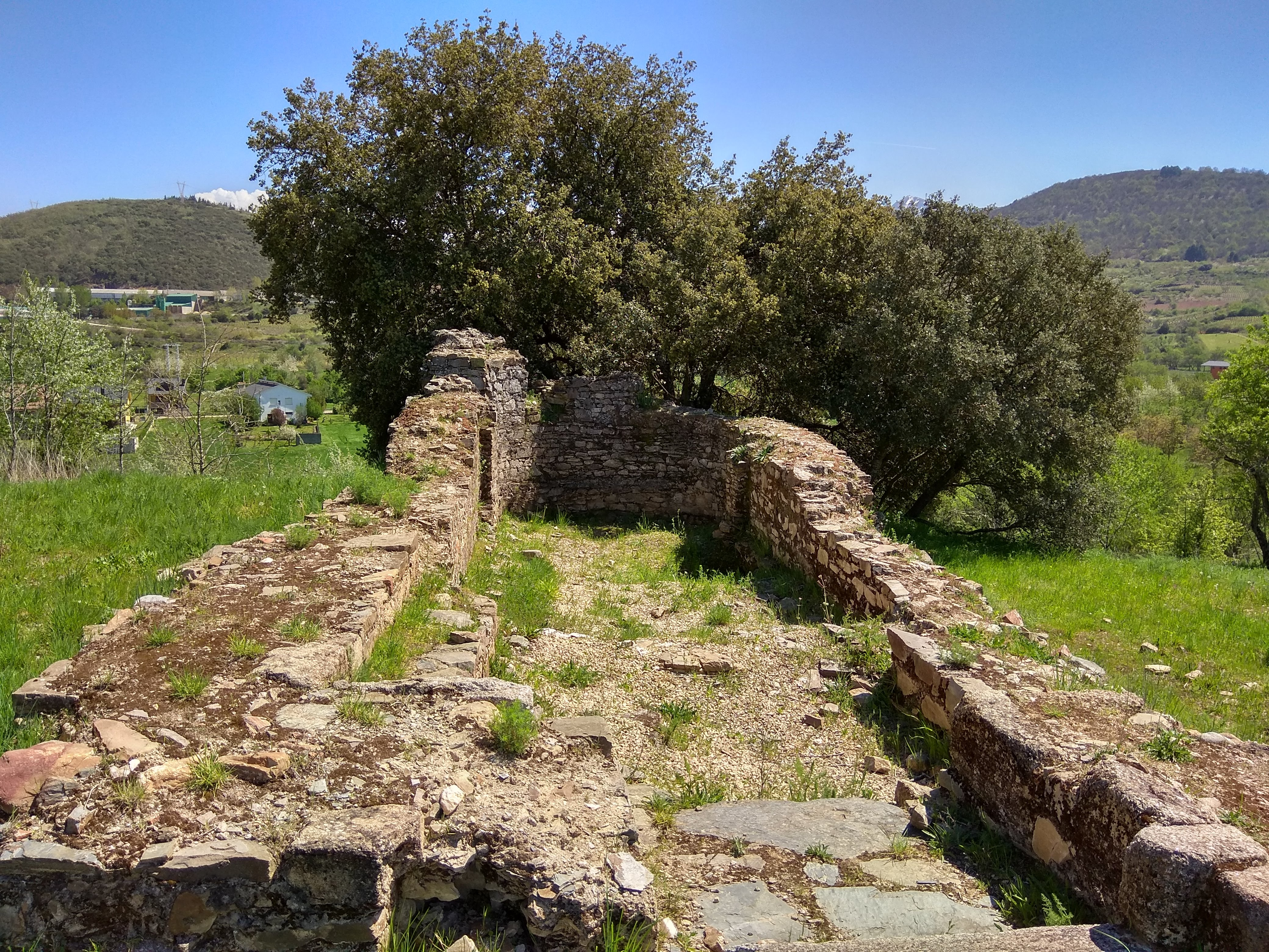 Imagen de las ruinas de la ermita de San Salvador